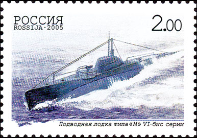 Почтовая марка России